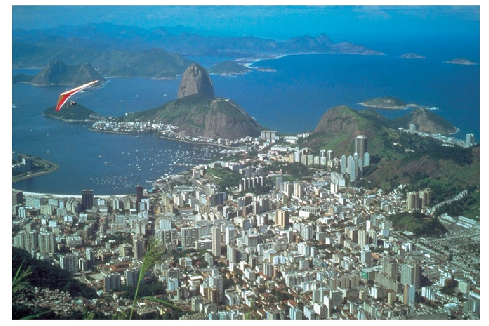 Rio de Janeiro, Brasil.